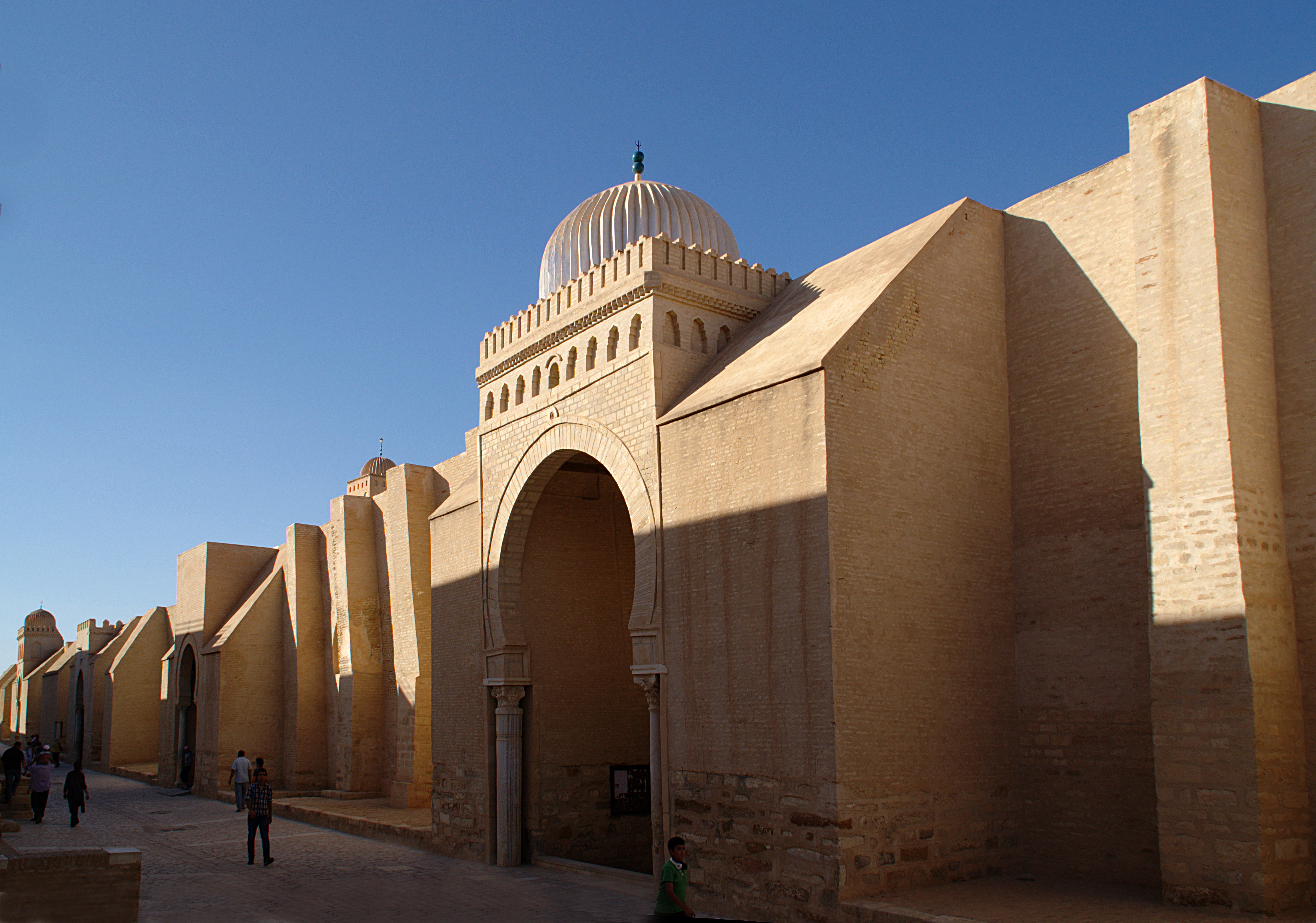 Grande Mosquée (Sidi Okba), Kairouan